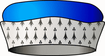 bonnet d`honneur